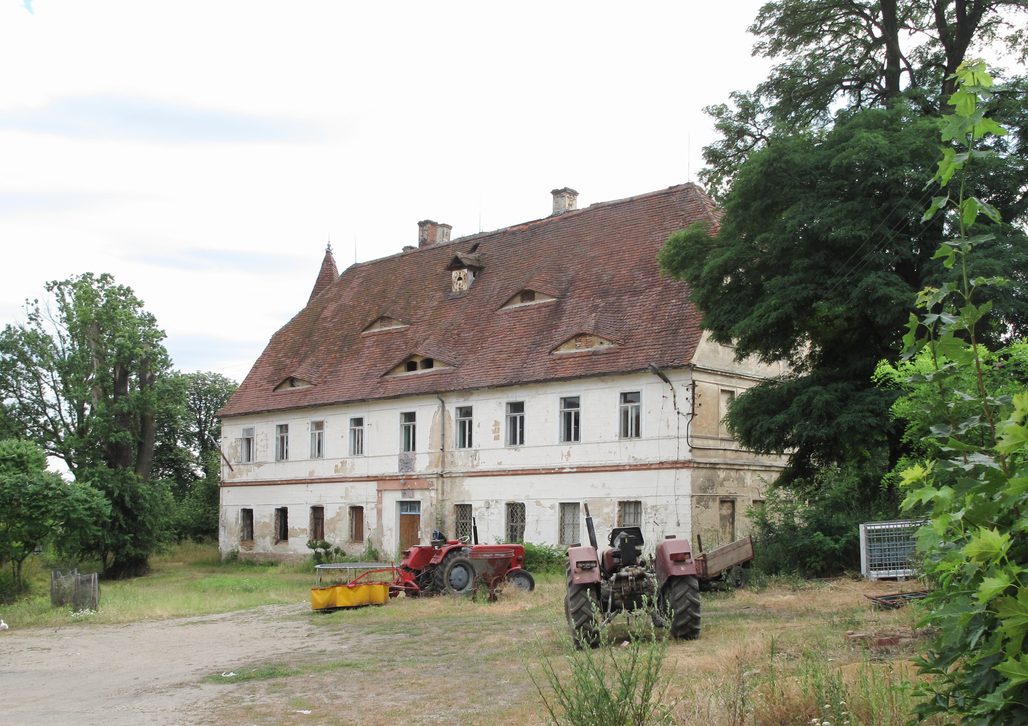 Ksawerów (województwo dolnośląskie). Polska.